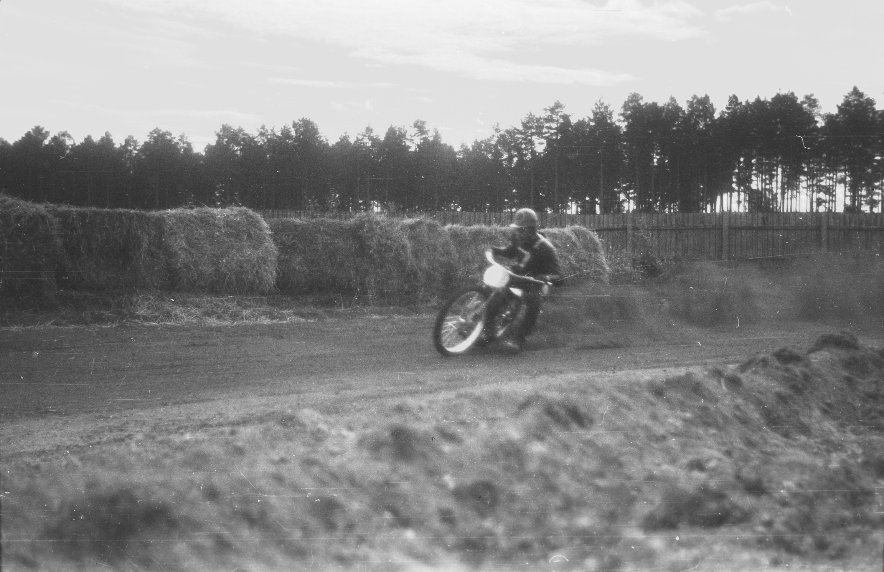 Motorsykkelløp på Fylkesidrettsplassen, Elverum